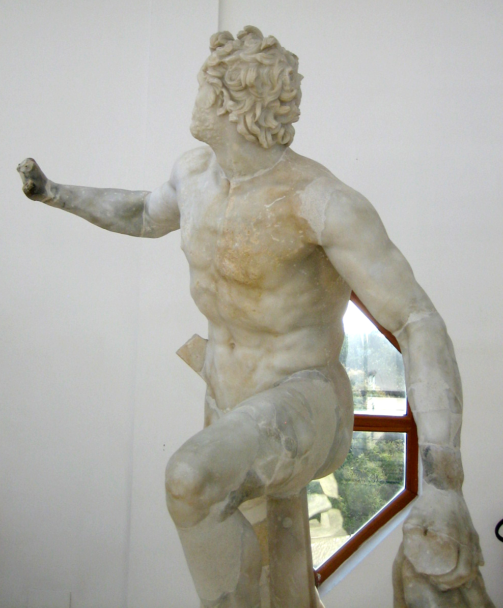 Il marinaio isolato, Gruppo di Polifemo